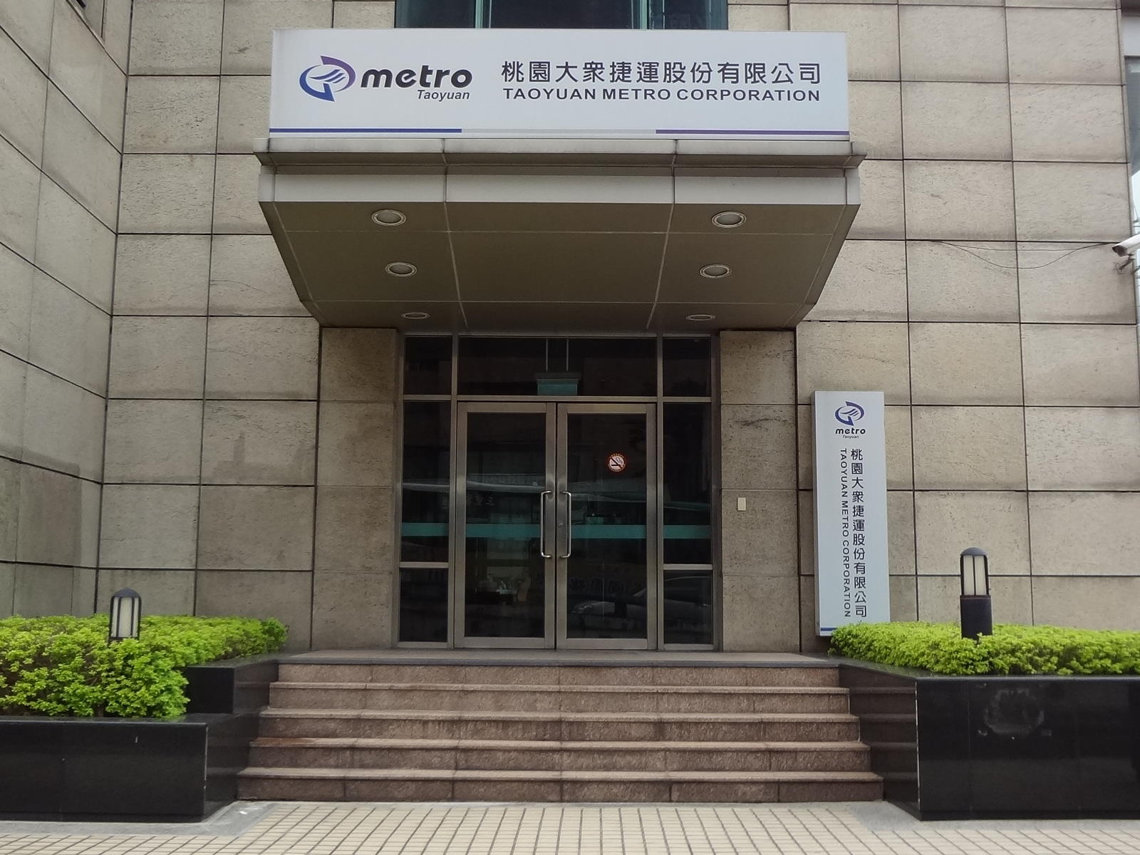 桃園捷運公司總部，位於桃園縣桃園市復興路189號12樓（中華電信桃園營運處）。2014年7月19日搬離。